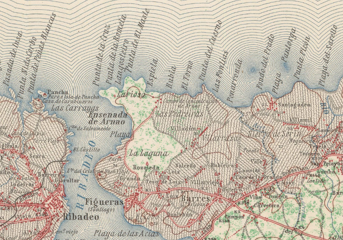 detalle del Mapa Topográfico Nacional: MTN50-0010-1944-nnn-Ribadeo